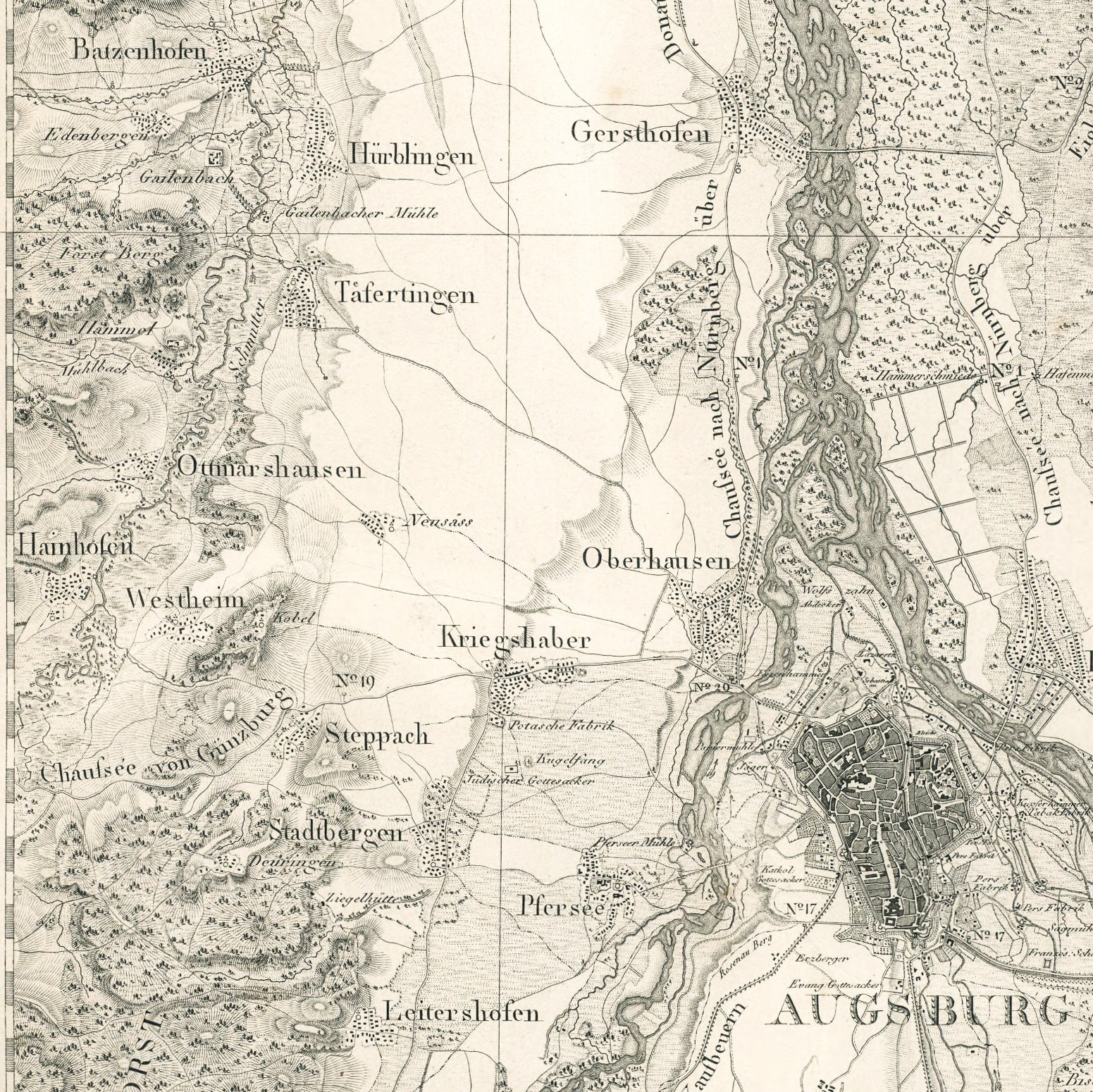 Augsburg, Topographischer Atlas vom Königreiche Baiern, 1:50000, Blatt 69 (Ausschnitt mit Augsburg und nordwestlich davon)